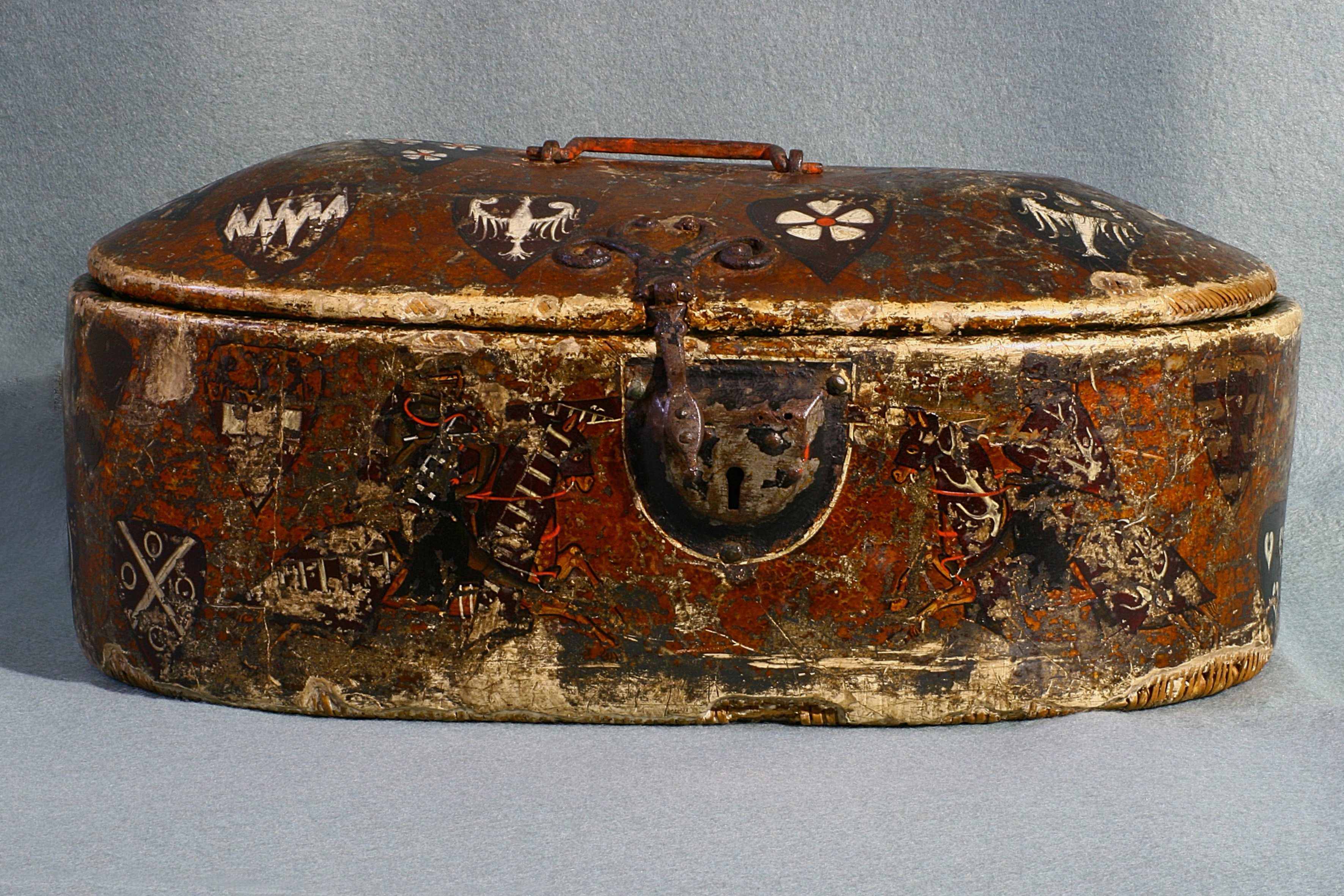 Heraldisches Denkmal der Mittelaters